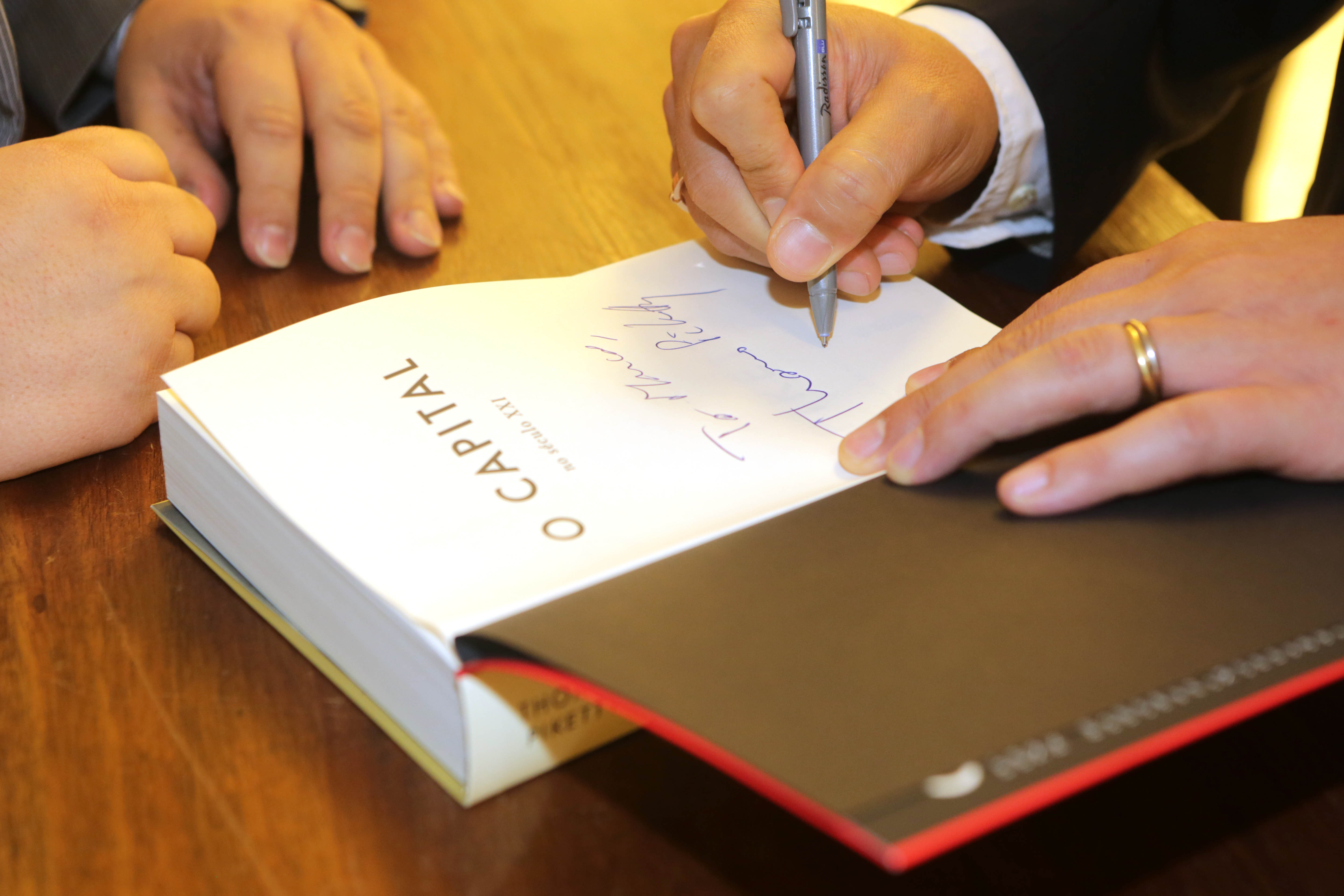 Convidado: Thomas Piketty, economista francês Data: 27 de setembro de 2017 Local: Teatro Santander Crédito das imagens: Fronteiras do Pensamento / Greg Salibian